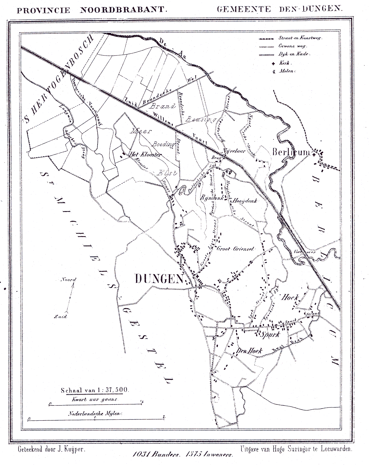 Nederland, Noord-Brabant, Gemeente Den Dungen